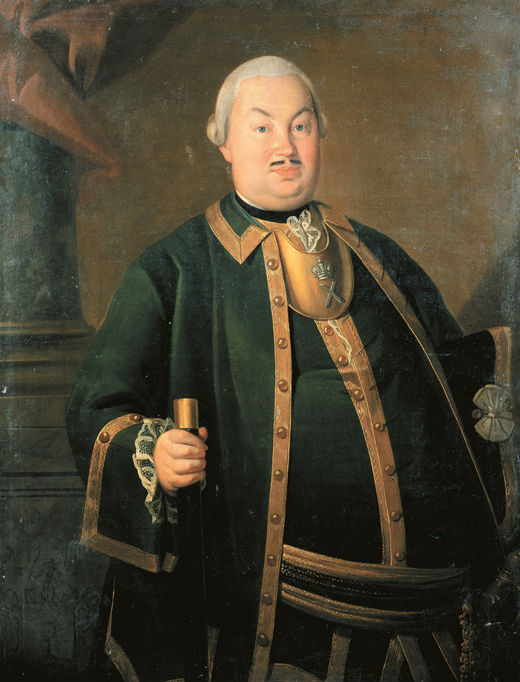 генерал П. Ф. Берхман